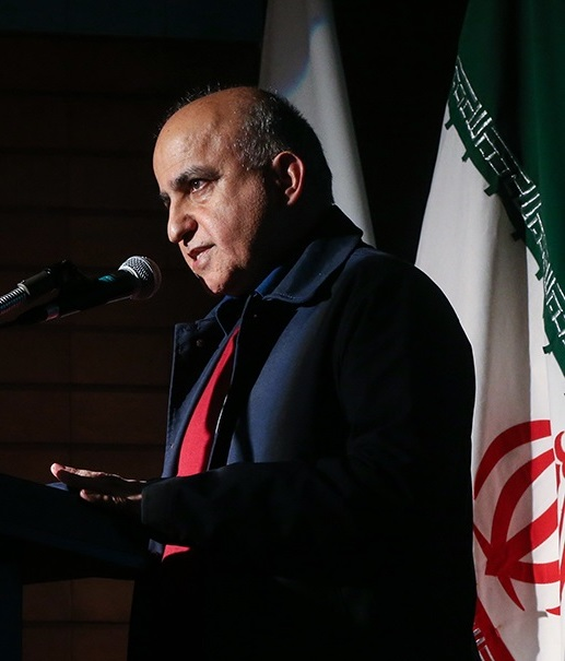 پرویز جاهد در جشن آغاز هشتاد و پنجمین سال زندگی جمشید مشایخی،‌ خانه هنرمندان